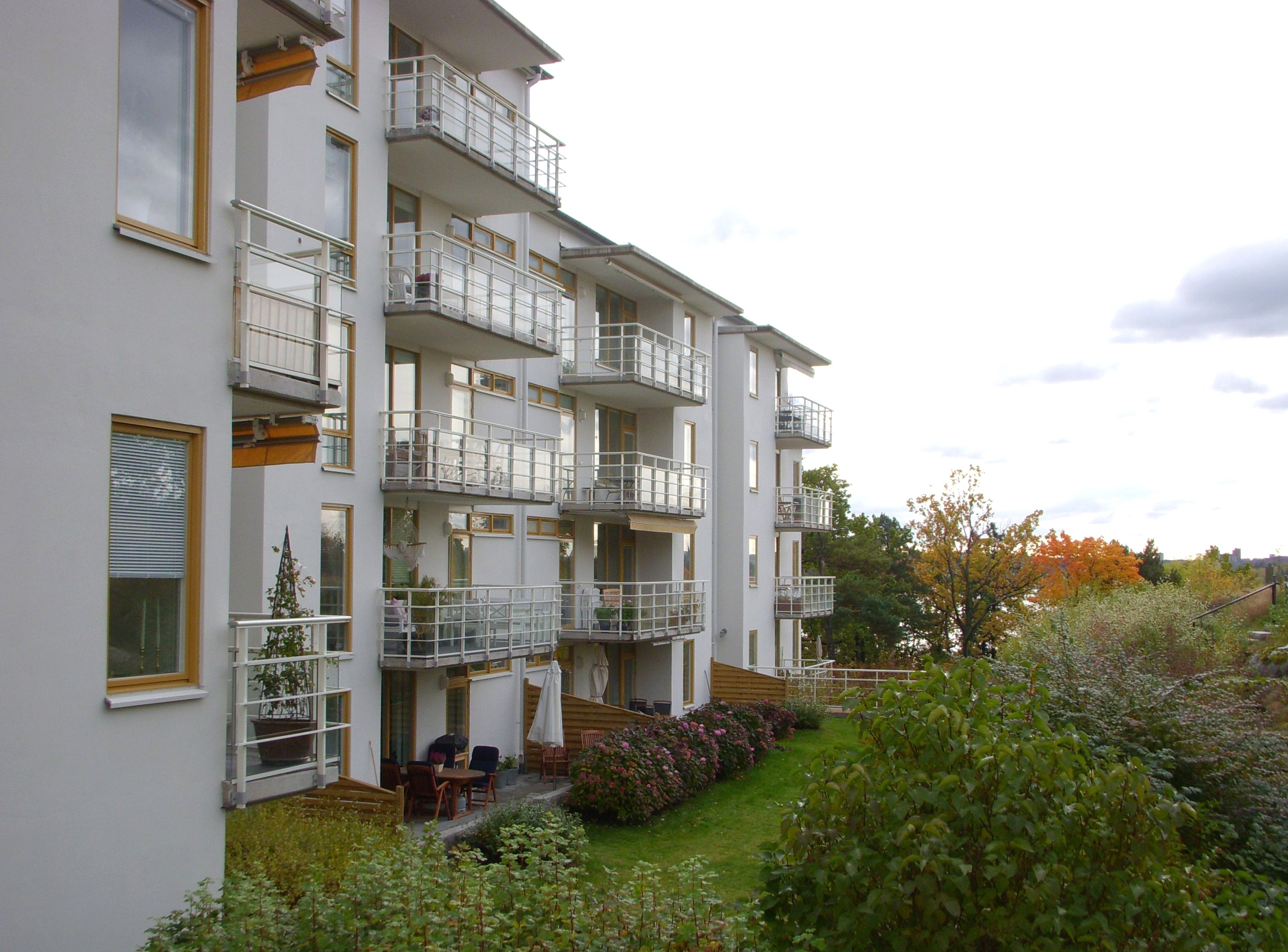 Bergsätras nyare bebyggelse, Bergsätravägen på Lidingö